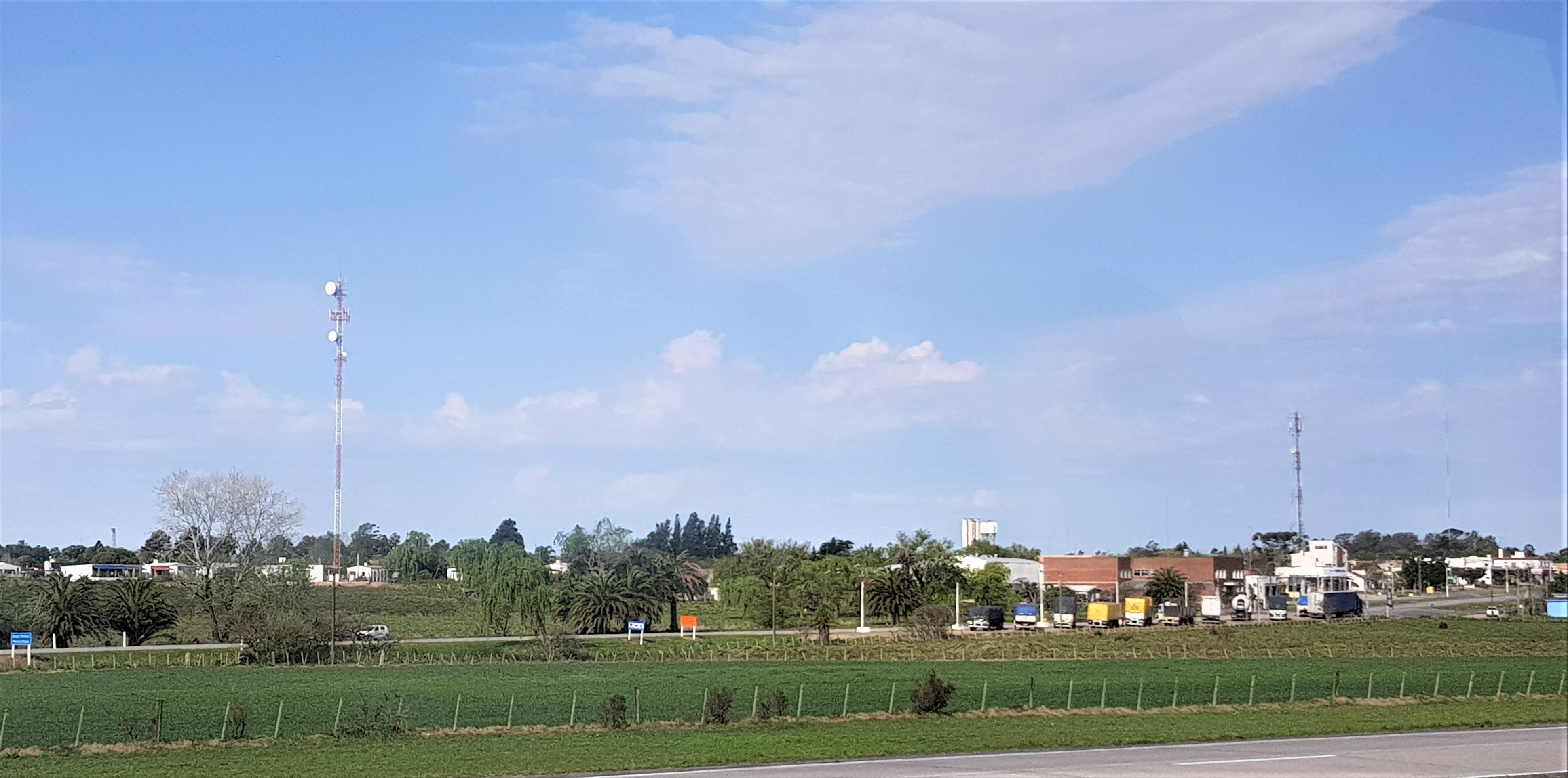 Vista parcial de la localidad desde la ruta 1 en setiembre de 2018